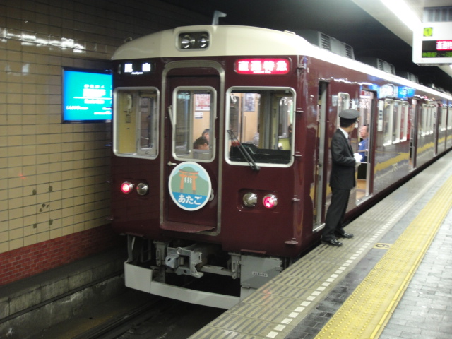 阪急・神戸線の臨時直通特急・嵐山行き「あたご」 高速神戸駅にて